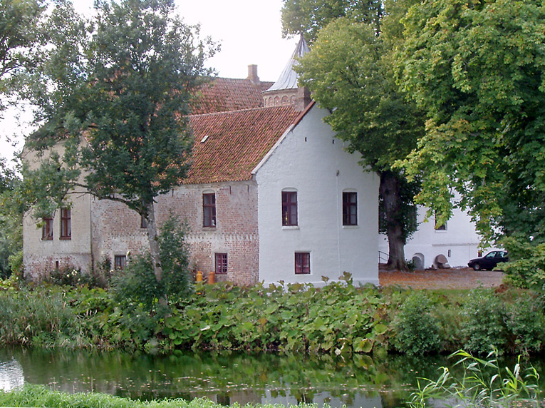 Lerkenfeldt er en heerregård ved Farsø i Himmerland, nærmere bestemt Vesterbølle Sogn, Rinds Herred, Viborg Amt, Denmark. Lerkenfeldt er en af danmarks ældste herregårde, kendt tilbage fra 1455.